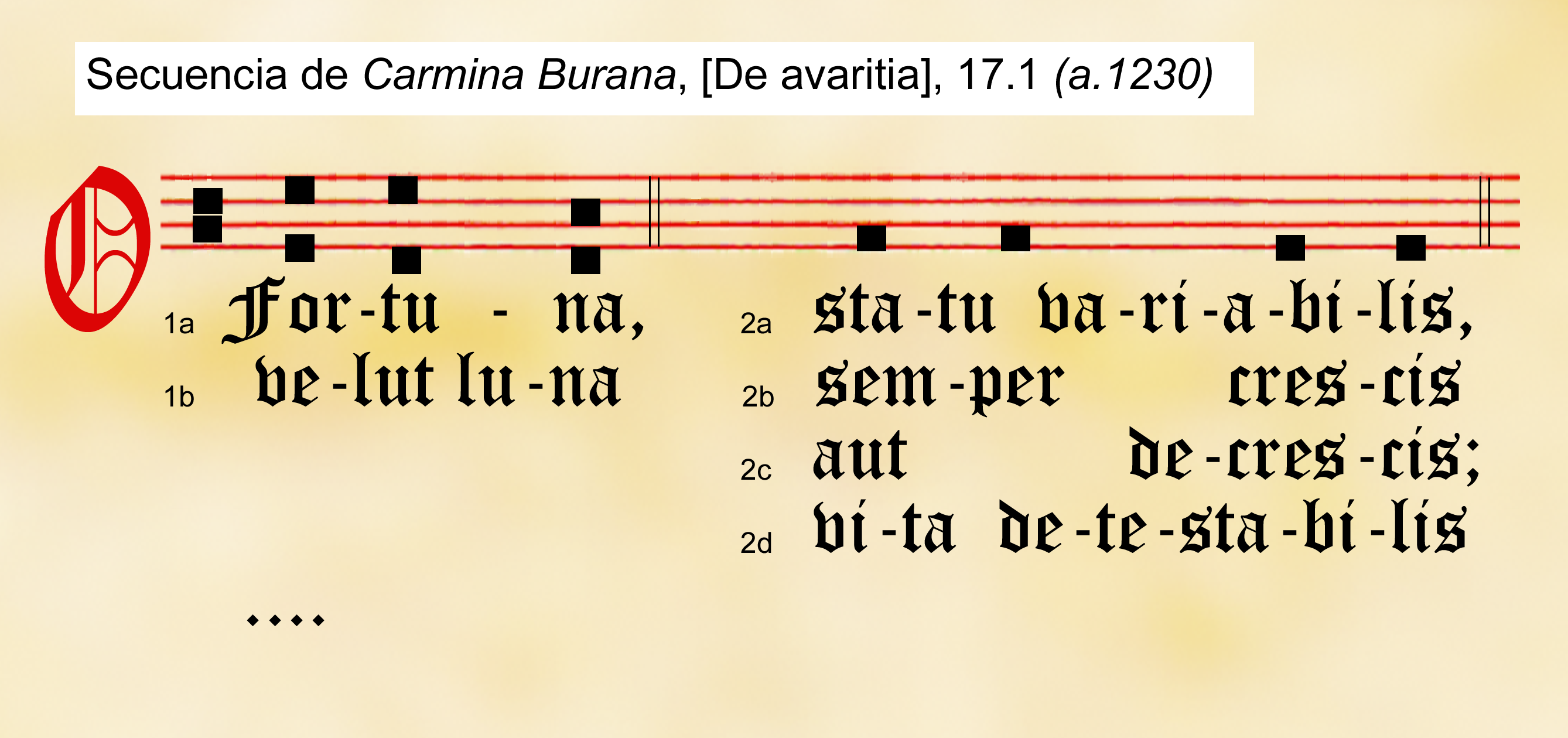 Secuencia: Carmina Burana I.- FORTUNA IMPERATRIX MUNDI, Carmina moralia et satirica (1-55), [De avaritia] (1-25) 17 1, (a. 1230). Monasterio Benediktbeuern (Bavaria), biblioteca Monacensis clm 4660/4660a, (Bayerische Staatsbibliothek München) Notación cuadratica aproximada, copia moderna.